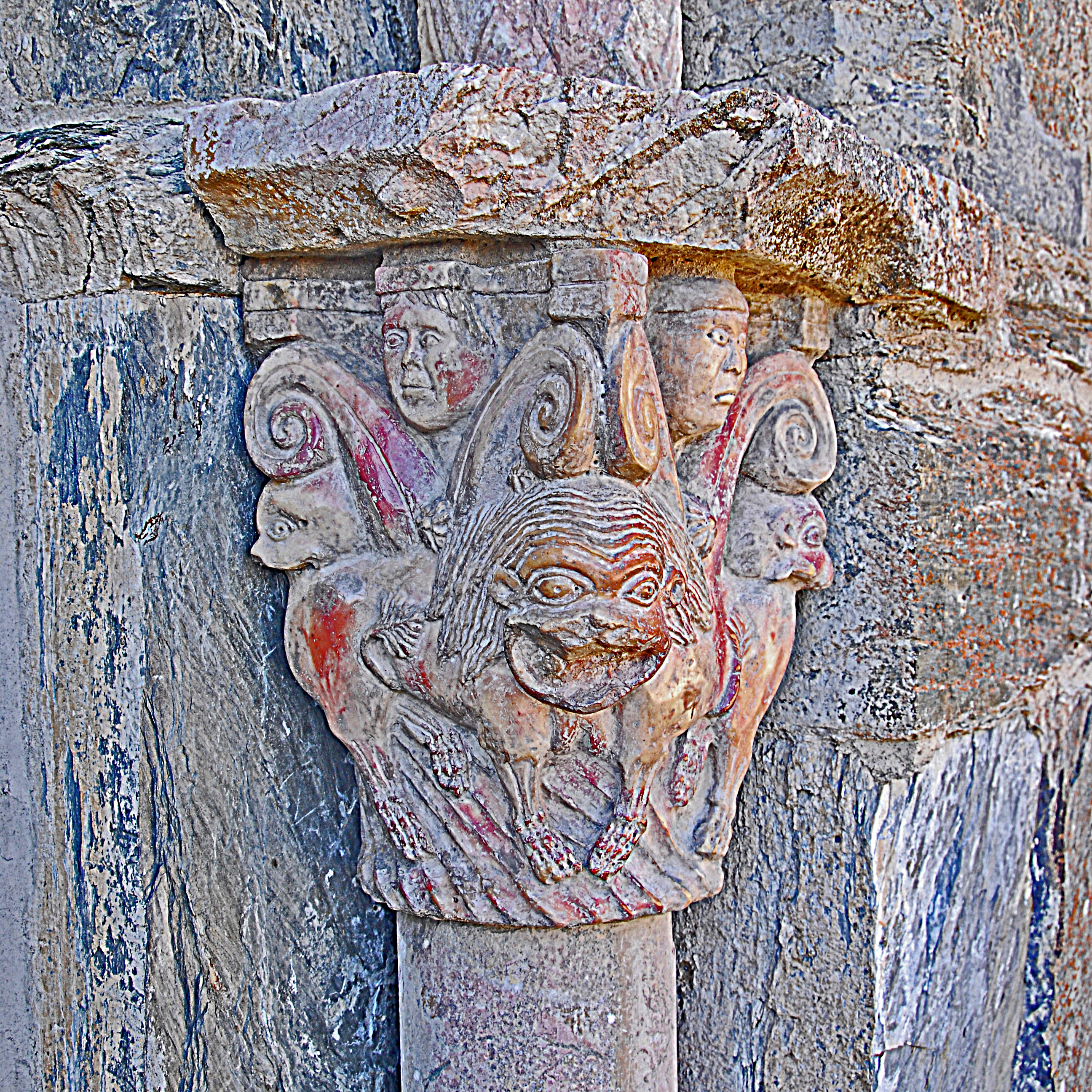 Prieuré de Serrabone, Nordfportal, Kapitell Löwen